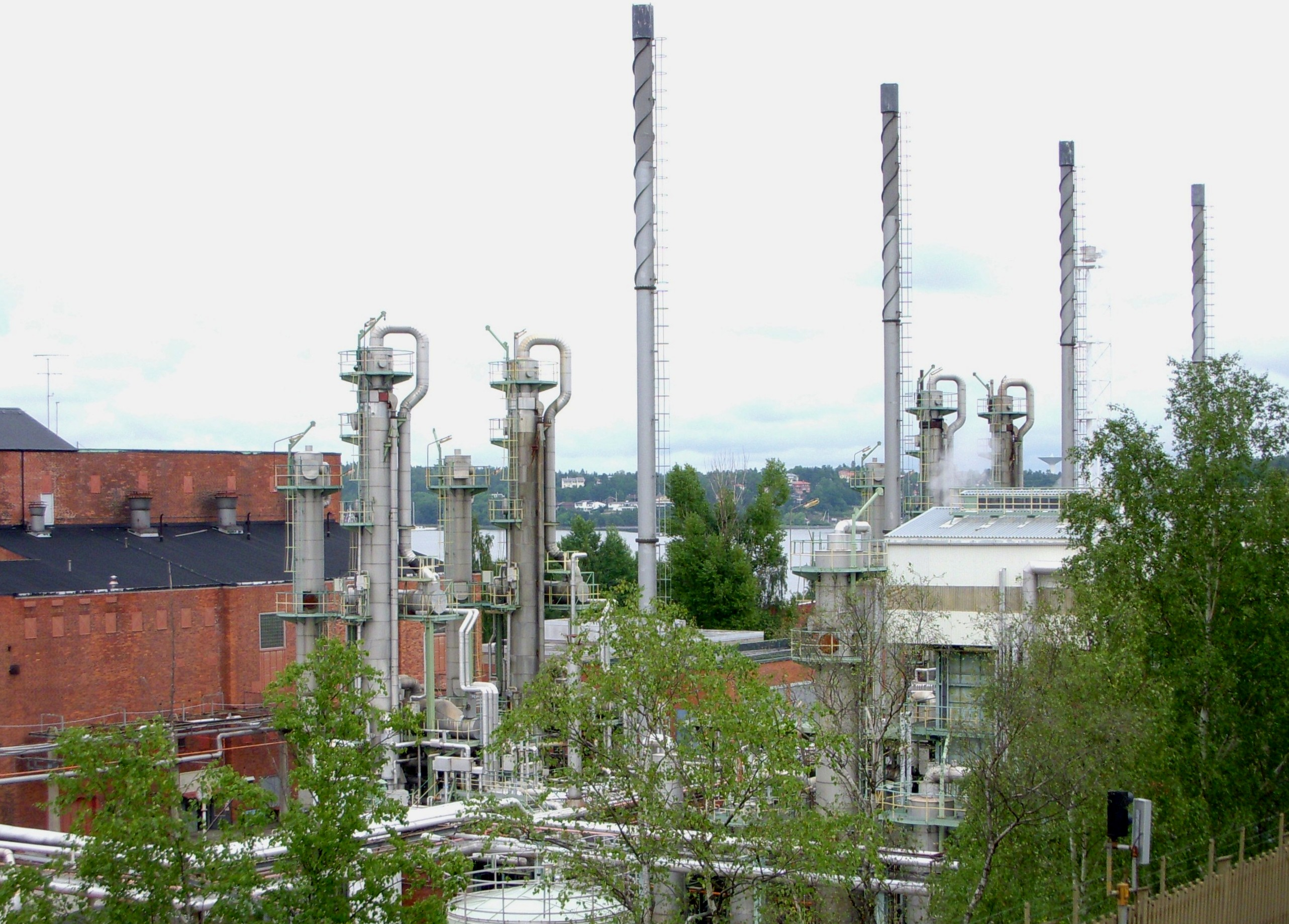 Spaltgasverket vid Hjorthagen, Värtan, Stockholm